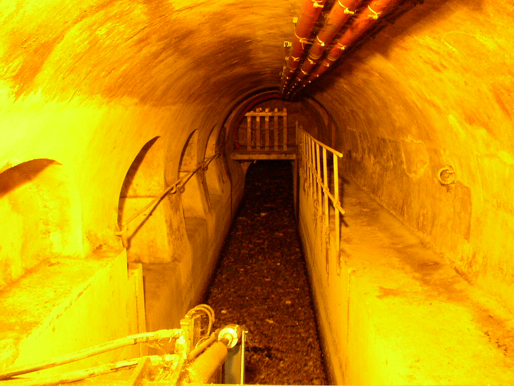 Raccoglitore di rifiuti solidi nel sistema fognario parigino. Immagine realizzata da pnc_net.